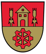 Im Wappen wird in seiner Symbolik Bezug auf den jahrhundertelang wichtigsten Wirtschaftszweig, den Getreideanbau genommen. Auf ihn weisen nicht nur die goldenen Ähren, sondern auch der dem ehemaligen Gemeindesiegel entnommene Turm, der als Getreidespeicherbau gedeutet wird, hin. Das Mühlrad steht als Zeichen für die an der Wulka liegenden drei Mühlen, von denen eine noch heute in Betrieb steht. Im höheren Sinn stellen diese Zeichen Symbole für die Lebenskraft (Ähren), die heimatliche Geborgenheit (Festes Haus) und den Fleiß (Rad) Eigenschaften der Gemeinde Antau dar.